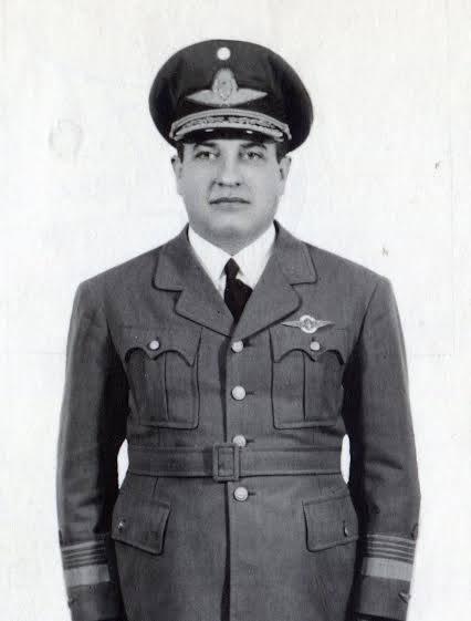 El por entonces Comodoro Edmundo Sustaita.